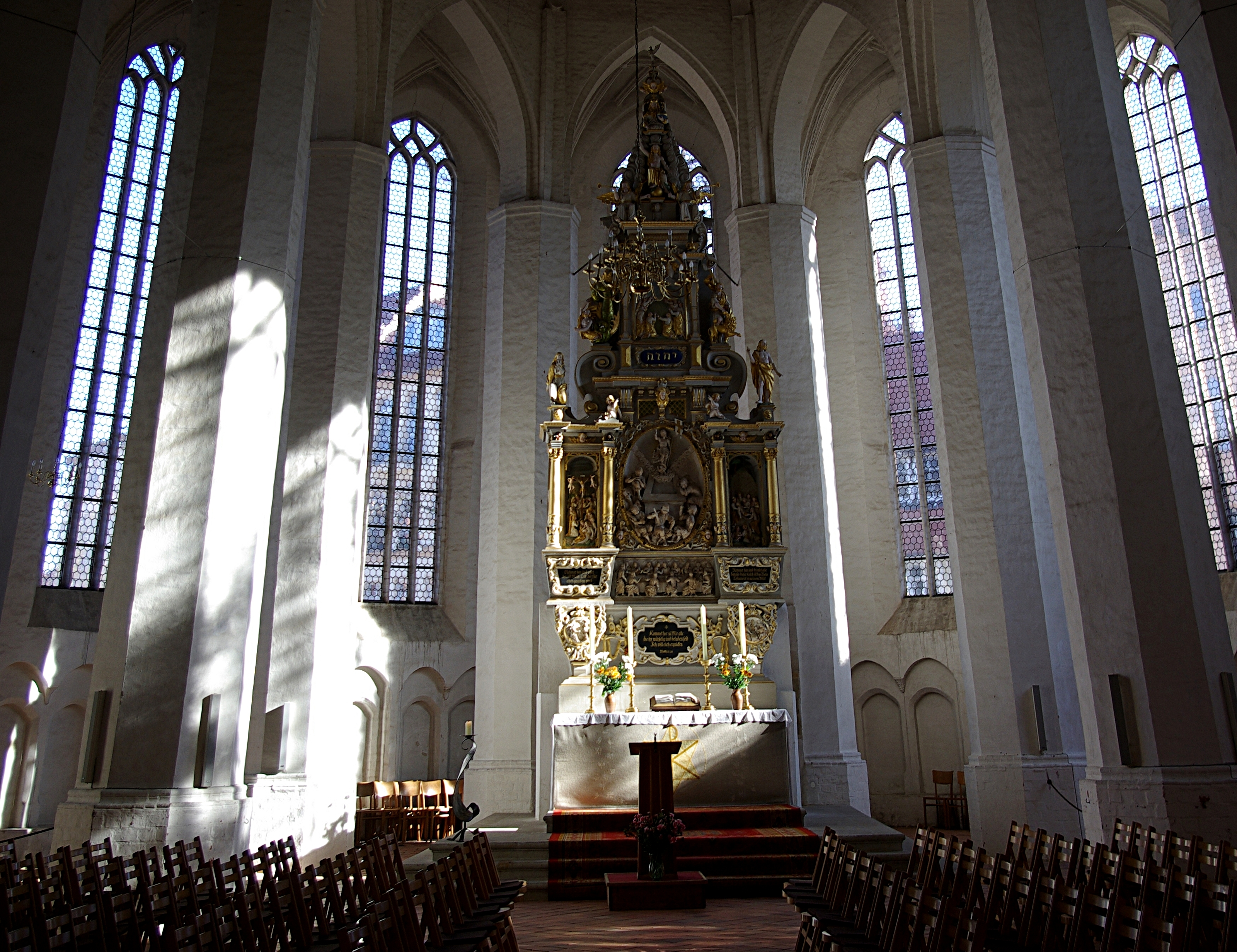 Cottbus in Brandenburg. Der Altar stammt aus dem Jahre 1664 und ist im Stil der Frühgotik errichtet worden.